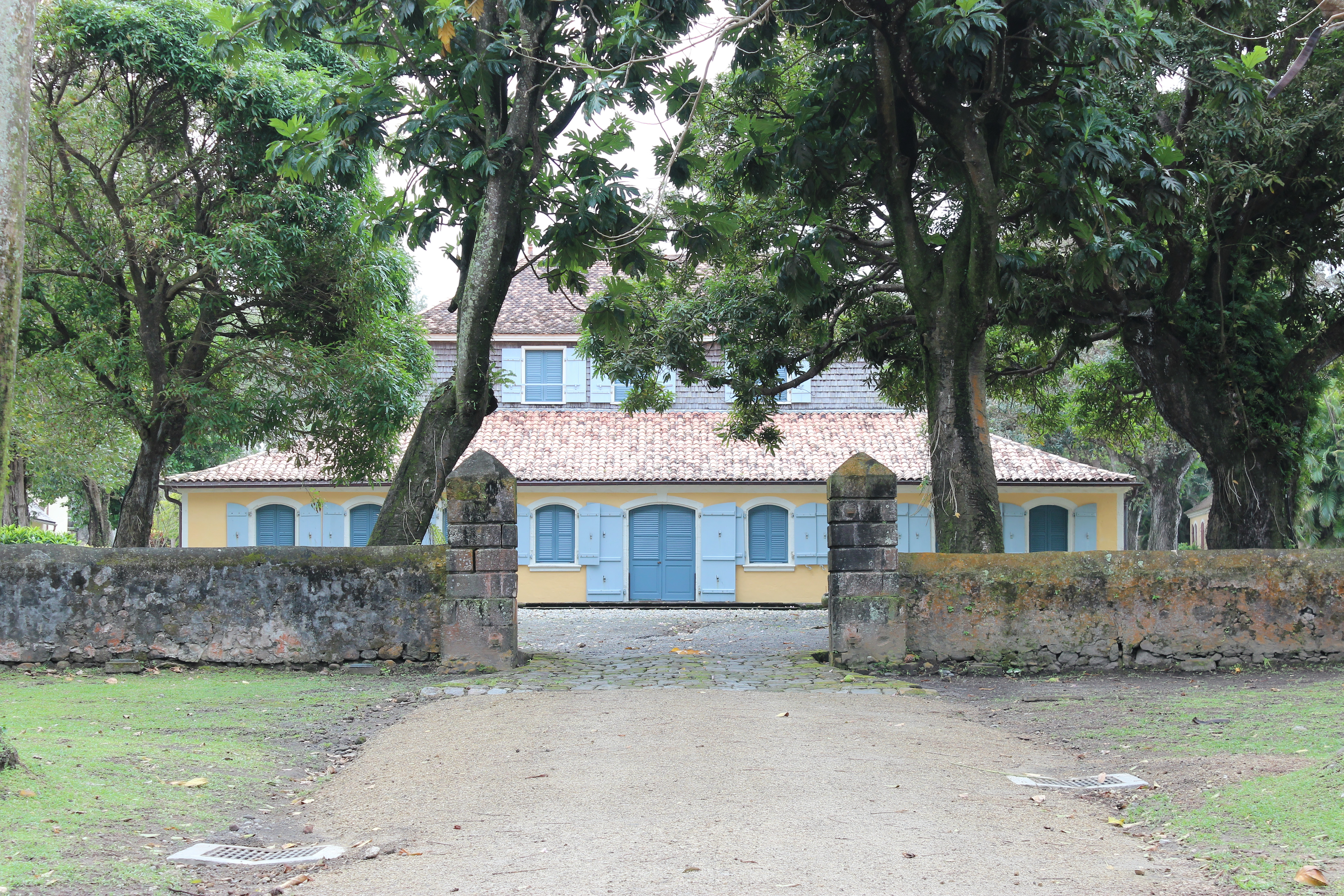 Habitation Pécoul, à Basse-Pointe (Martinique), classée au titre des monuments historiques (réf. PA00105935)